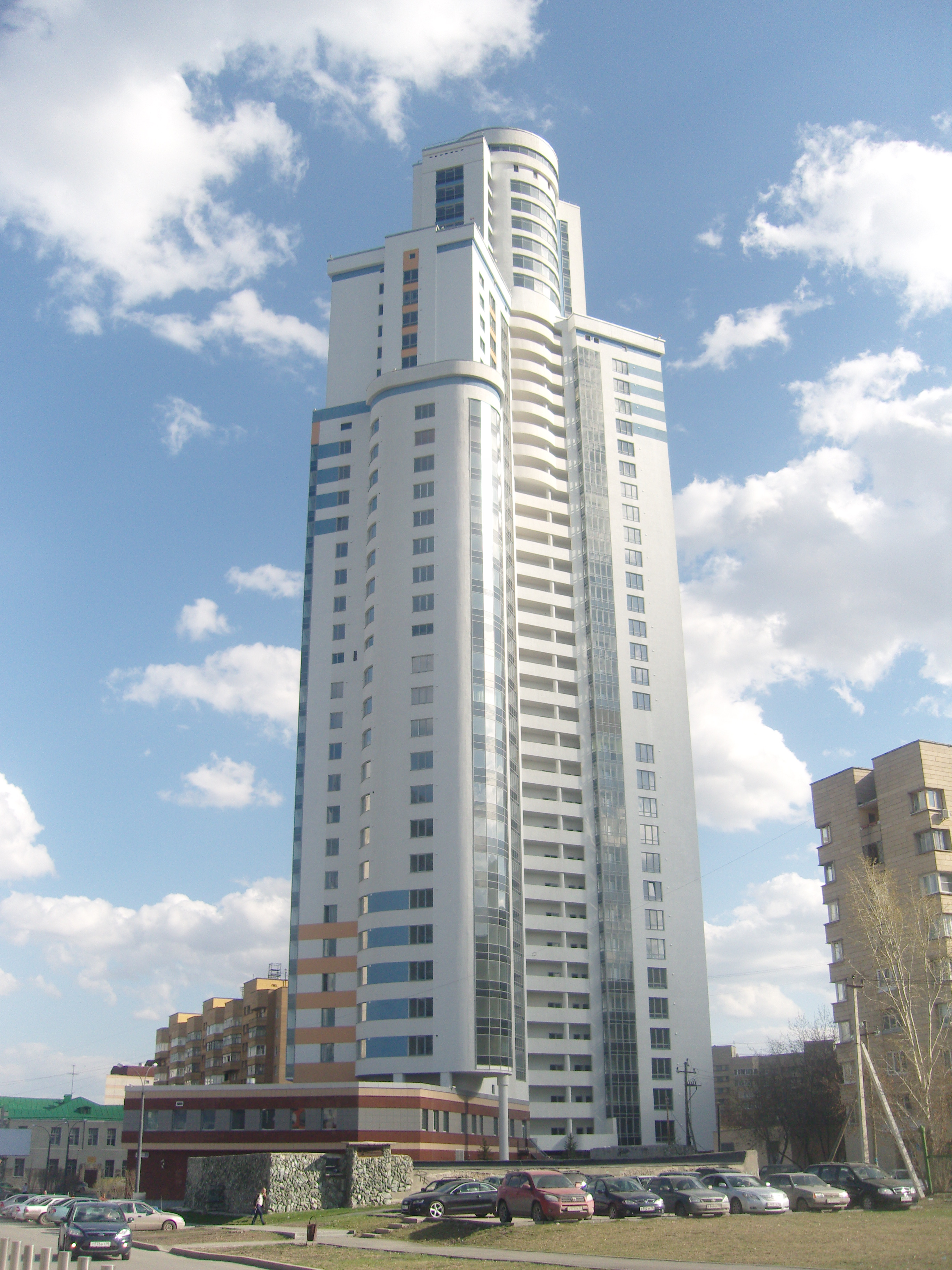 Высотное здание "Февральская Революция"